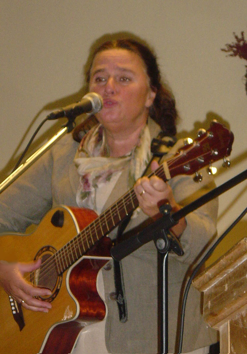 Christina Imsen